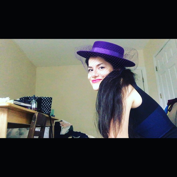 Discutiendo conceptos de neurocinematica y neurobiología, Cambridge, Massachusetts.